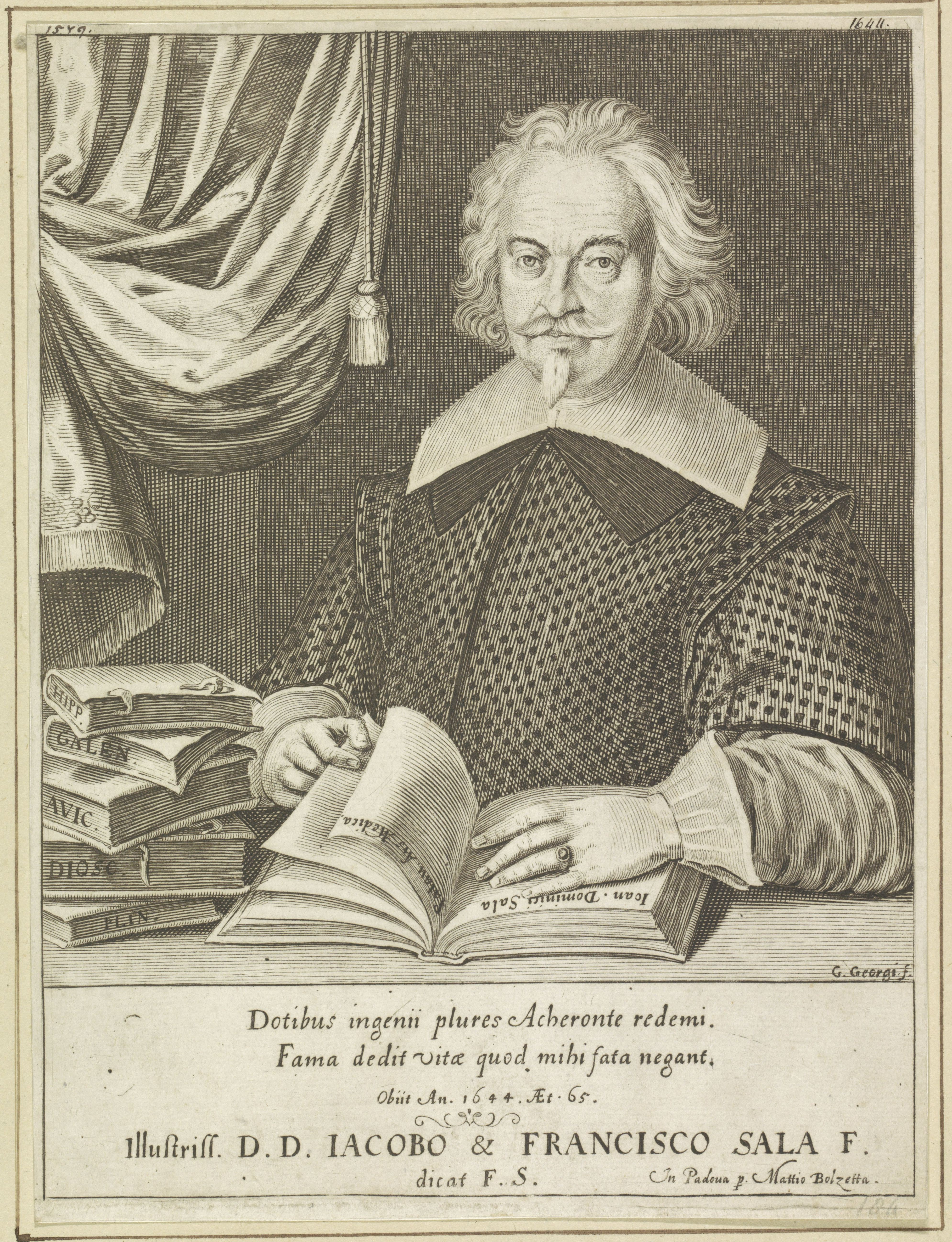 IdentificatieTitel(s): Portret van schrijver Giovanni Domenico SalaObjecttype: prent Objectnummer: RP-P-1909-4954Opschriften / Merken: verzamelaarsmerk, verso, gestempeld: Lugt 2228opschrift, recto, handgeschreven in bruine inkt: ‘1549 / 1644’VervaardigingVervaardiger: prentmaker: Giovanni Georgi (vermeld op object)opgedragen door: Mattio Bolzetta (vermeld op object)opgedragen aan: Giovanni Domenico Sala (vermeld op object)opgedragen aan: Francisco Sala (vermeld op object)Plaats vervaardiging: prentmaker: Italiëopgedragen door: Paduaopgedragen aan: Italiëopgedragen aan: ItaliëDatering: in of na 1644Fysieke kenmerken: gravureMateriaal: papier Techniek: graveren (drukprocedé)Afmetingen: blad: h 218 mm (Binnen plaatrand afgesneden.) × b 162 mm (Binnen plaatrand afgesneden.)ToelichtingOp opzetvel geplakt en voorzien van een kader in pen in bruin.OnderwerpWat: historical personsportrait of a writerWie: Giovanni Domenico SalaVerwerving en rechtenVerwerving: aankoop 1905Copyright: Publiek domein